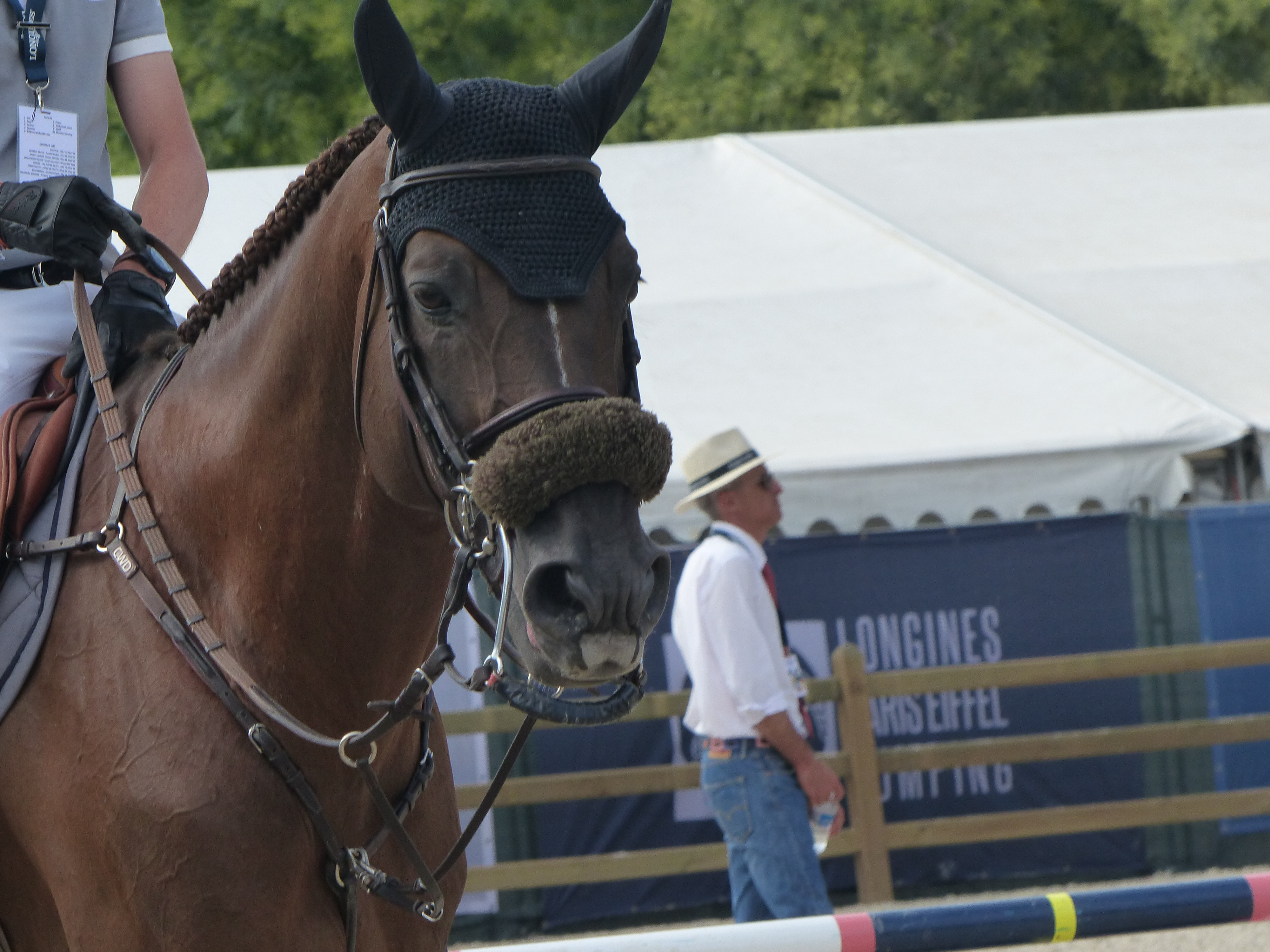 Harrie Smolders montant Don VHP Z N.O.P. au Paris Eiffel Jumping 2018.